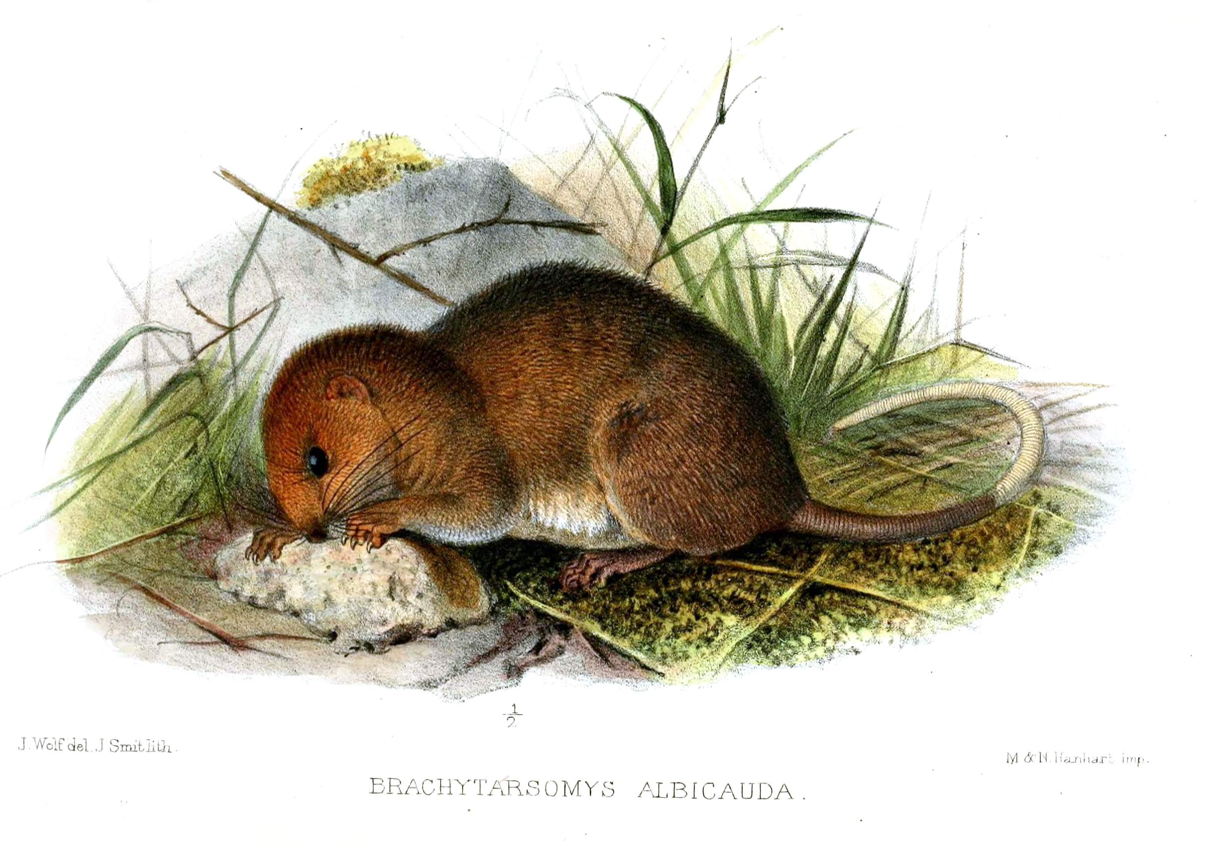 Brachytarsomys albicaudata